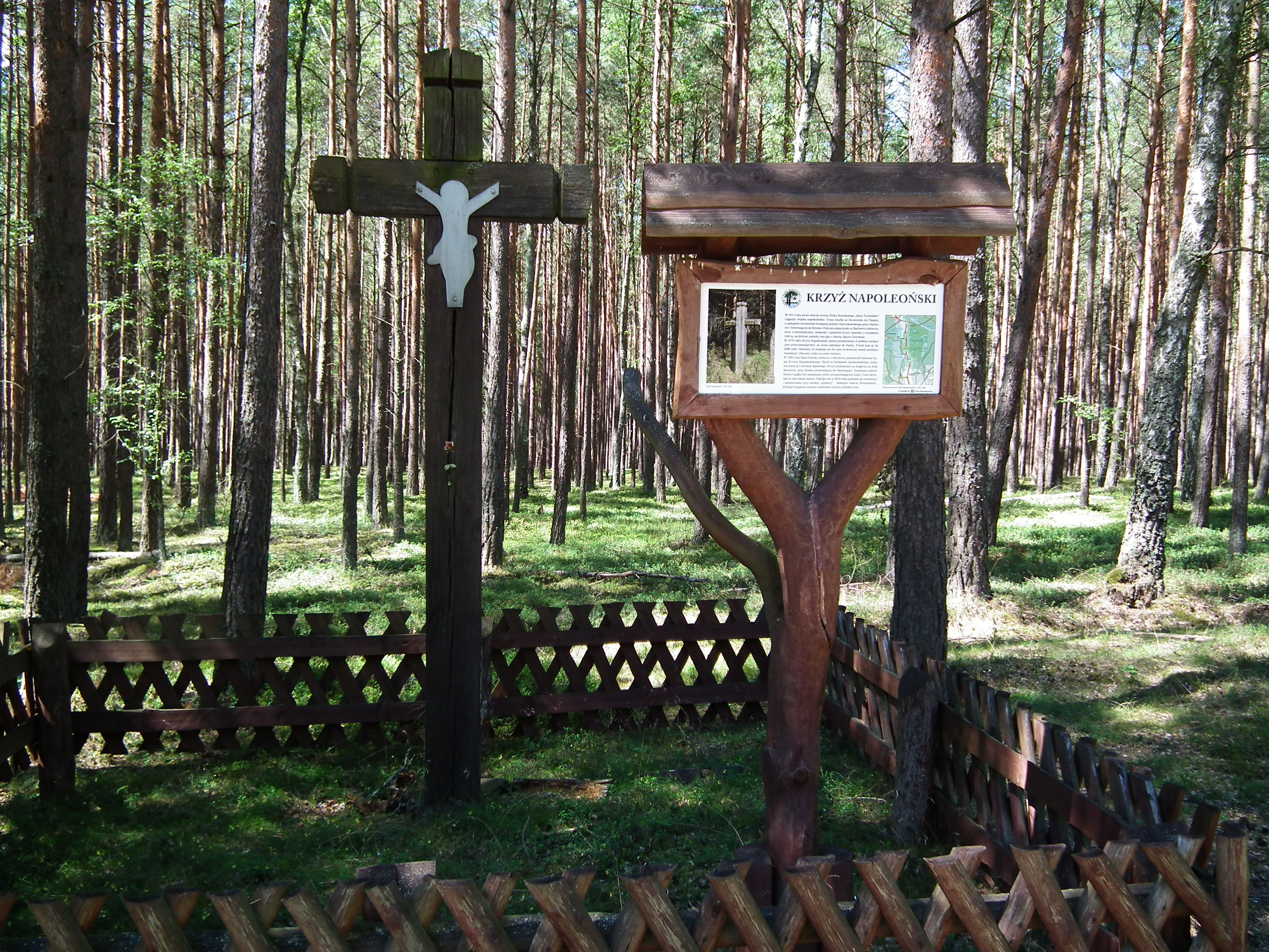 Krzyż Napoleoński przy Drodze Pilskiej w Borach Tucholskich koło Bachorza.